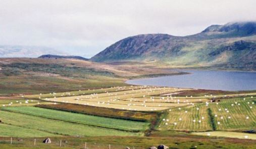 Cultures et paysages naturels à Vatnahverfi.